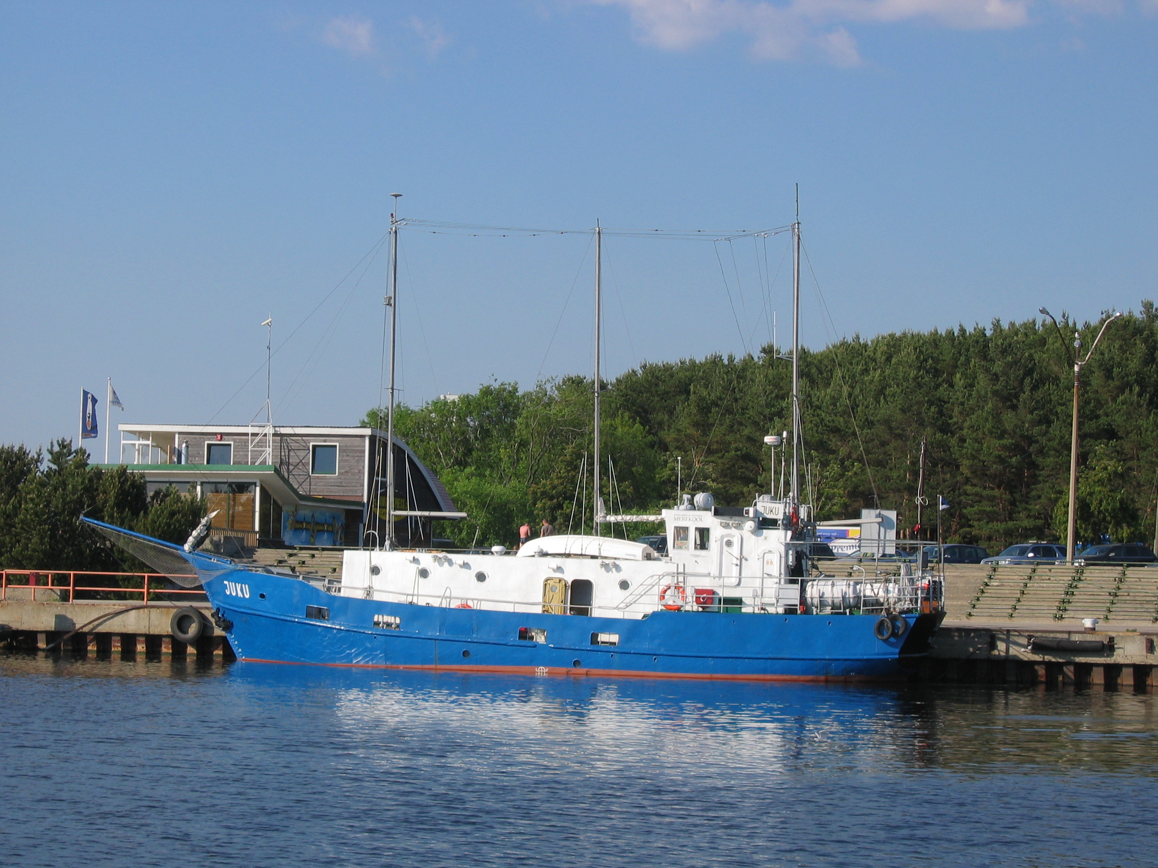 Juku Pirita sadamas